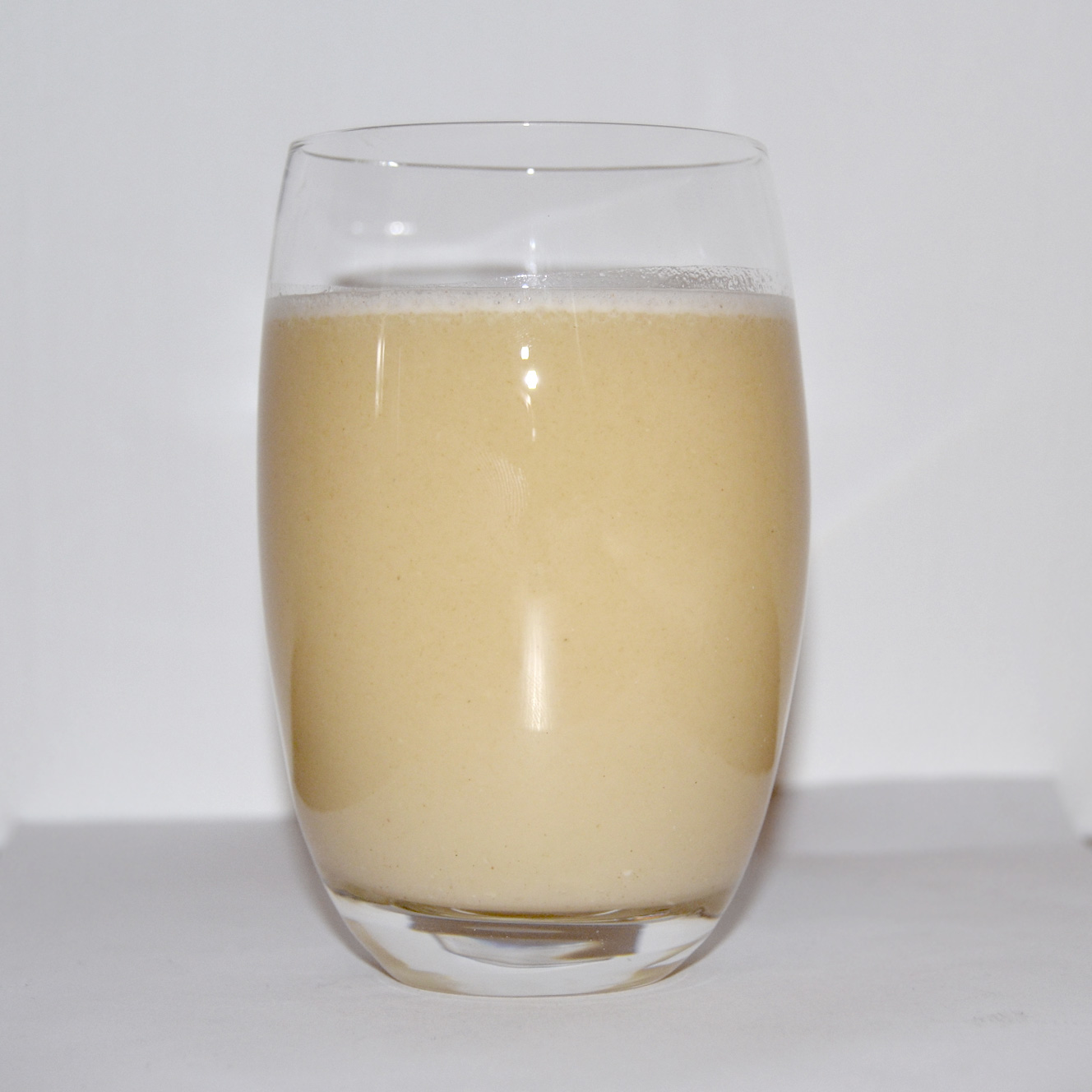 Glass of MANA